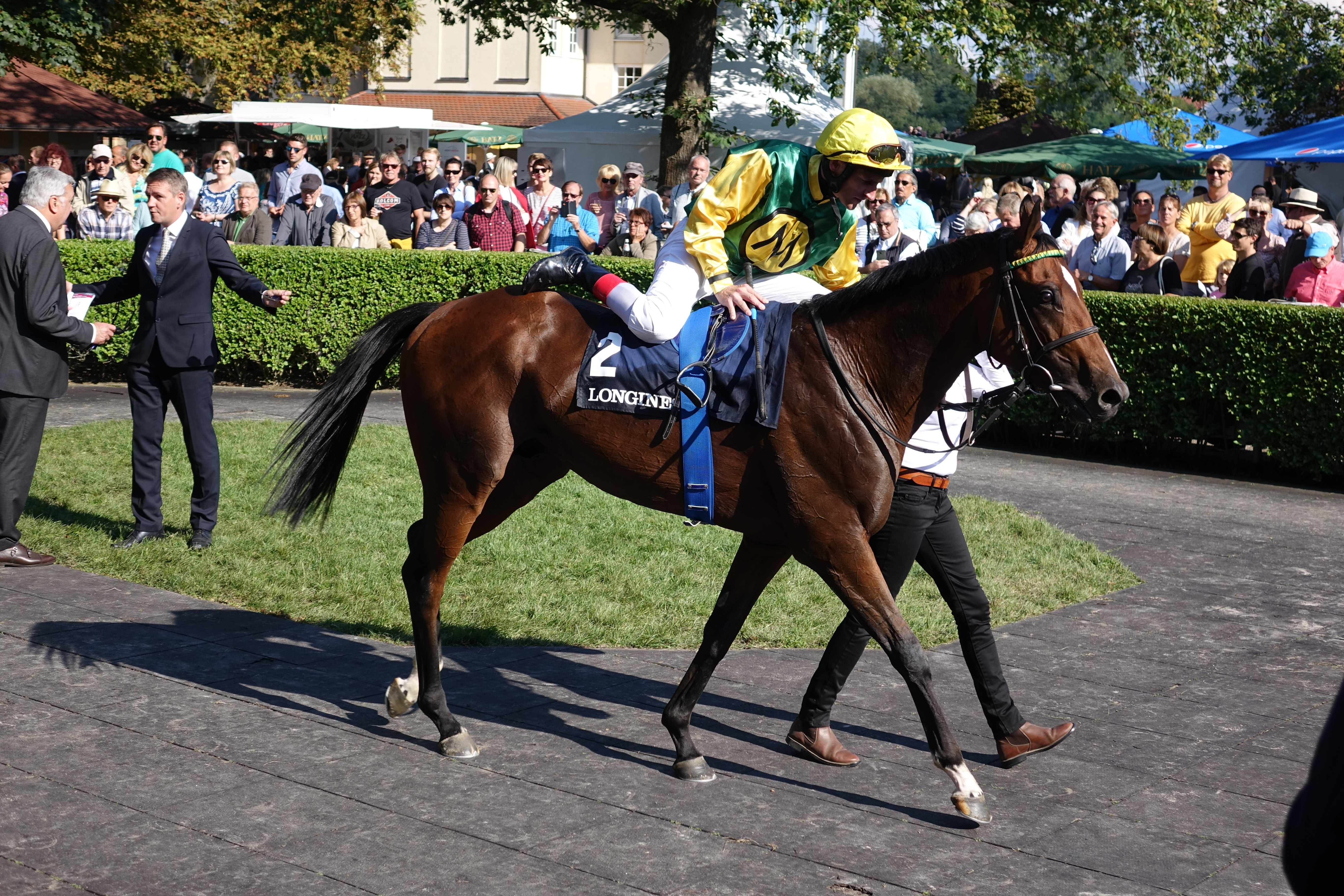 Der zweitplatzierte Hengst Iquitos beim Großen Preis von Baden 2017